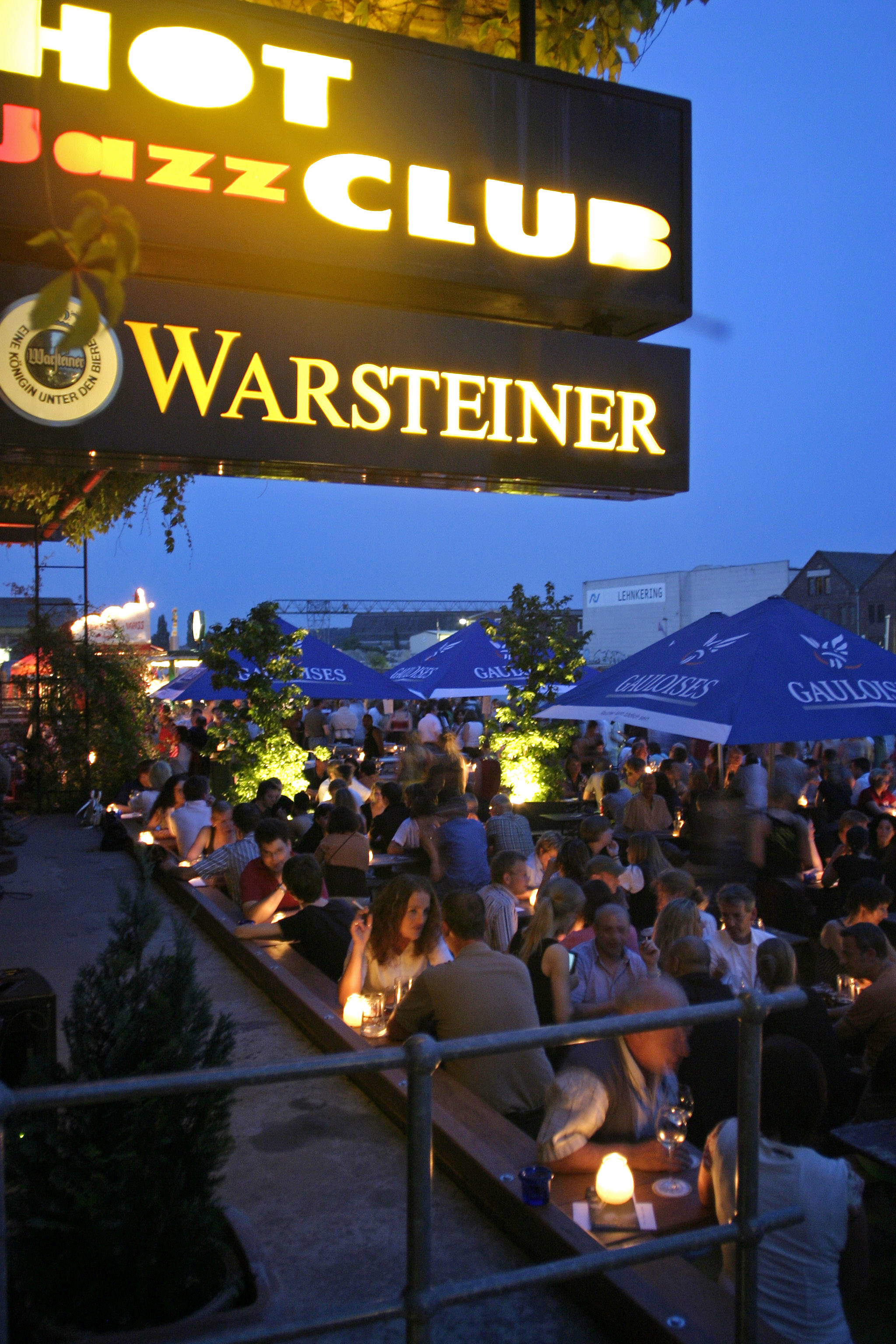 Außenansicht Hot Jazz Club in Münster